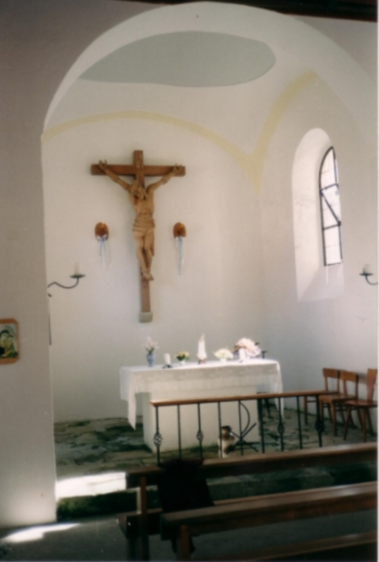 Haidmühle, Johann-Nepomuk-Kirche Leopoldsreut innen